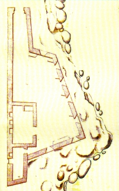 Forte da Casa da Salga. MACHADO, Francisco Xavier. "Revista dos Fortes e Redutos da Ilha Terceira" (1772). in MARTINS, José Salgado, "Património Edificado da Ilha Terceira: o Passado e o Presente". Separata da "Atlântida", vol. LII, 2007. p. 29.